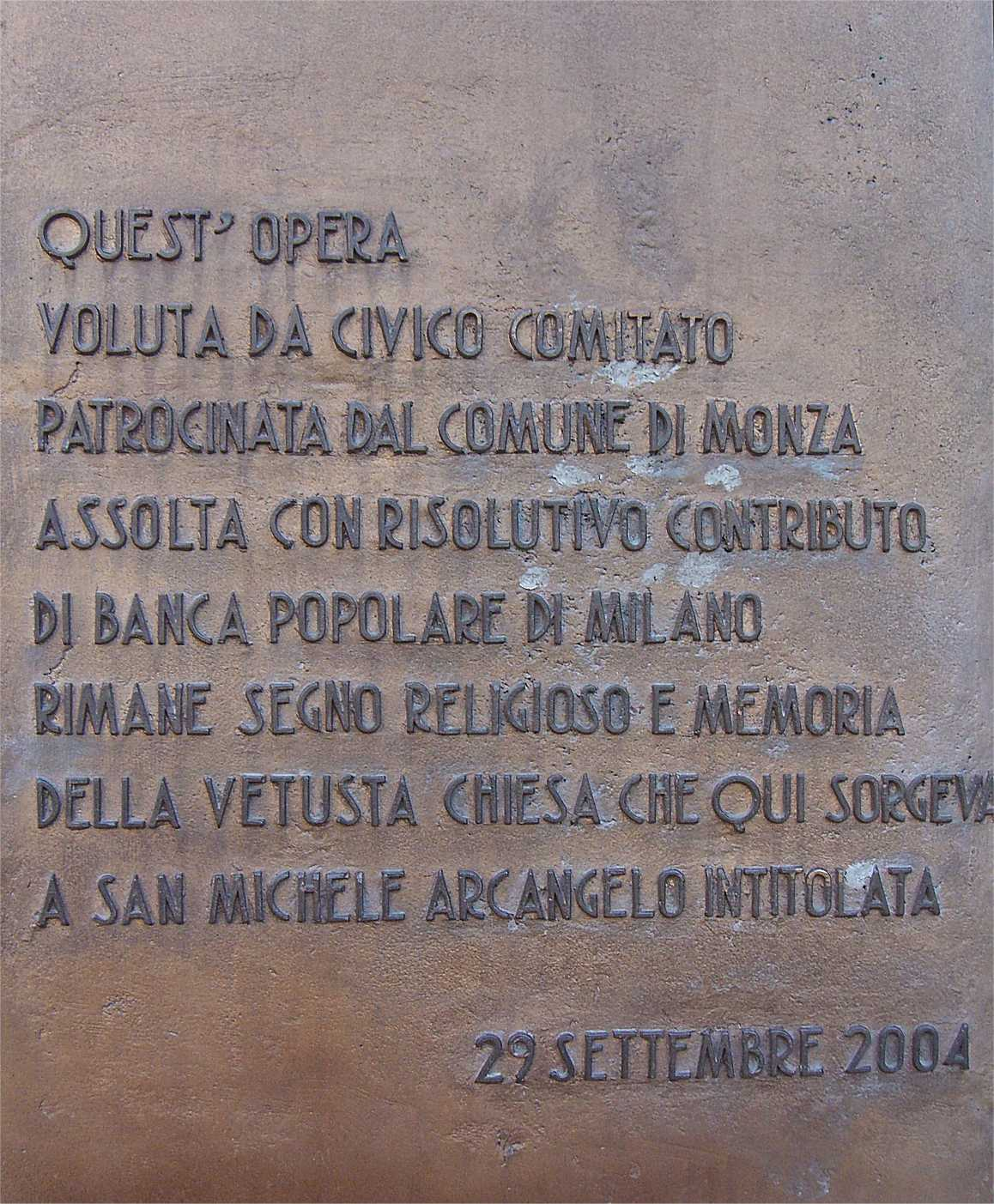 MB Monza - targa posta ai piedi dell'angelo bronzeo collocato nel luogo dove sorgeva l'antica chiesetta di San Michele Arcangelo vicina all'oratorio di Santa Marta